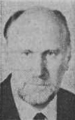 Arkitekten Sten Jonson